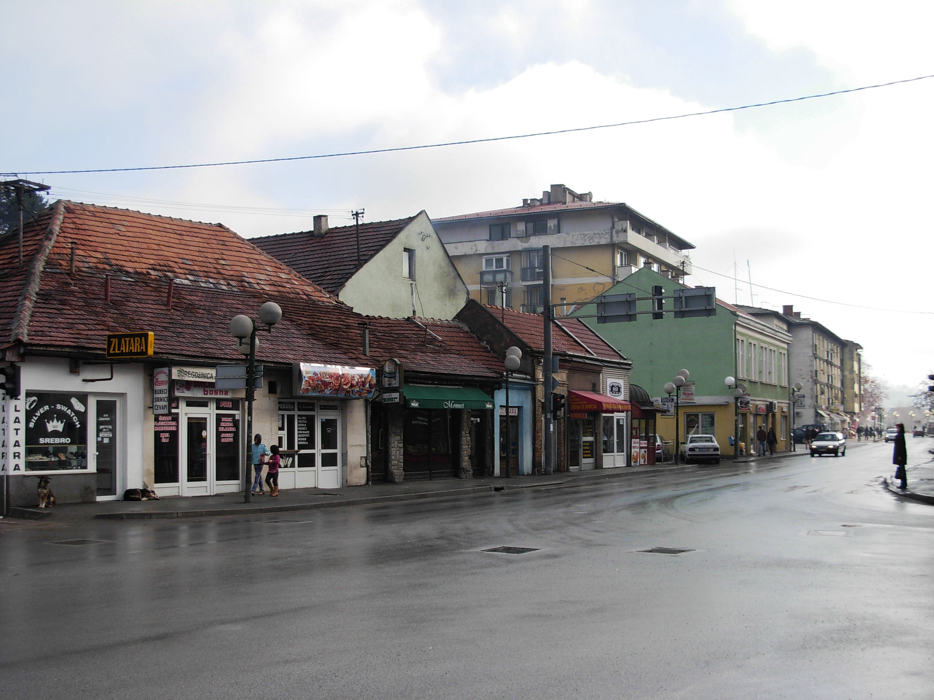 Ulica u Donjem Vakufu.